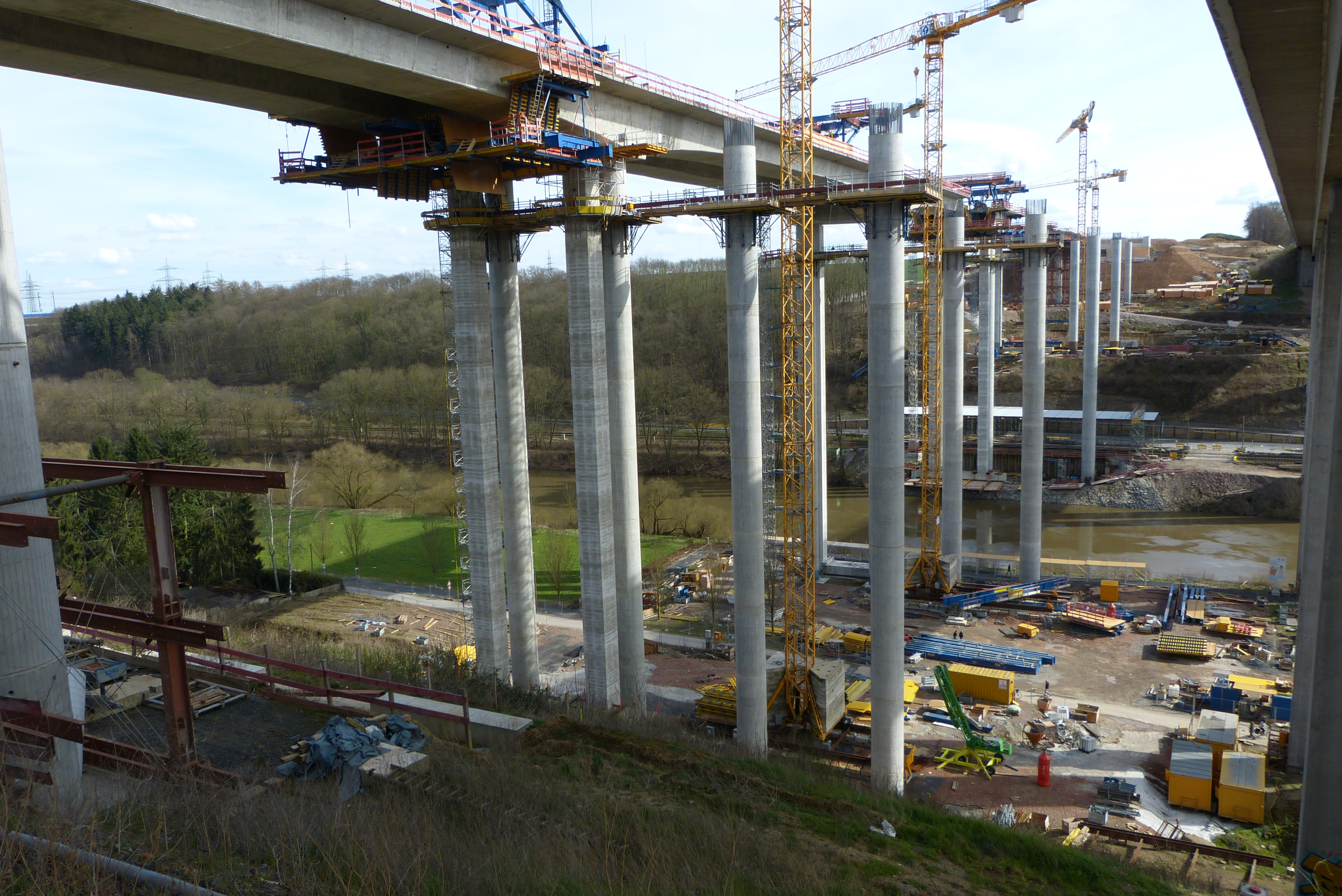 Neubau der Autobahnbrücke über das Lahntal bei Limburg, BAB A3